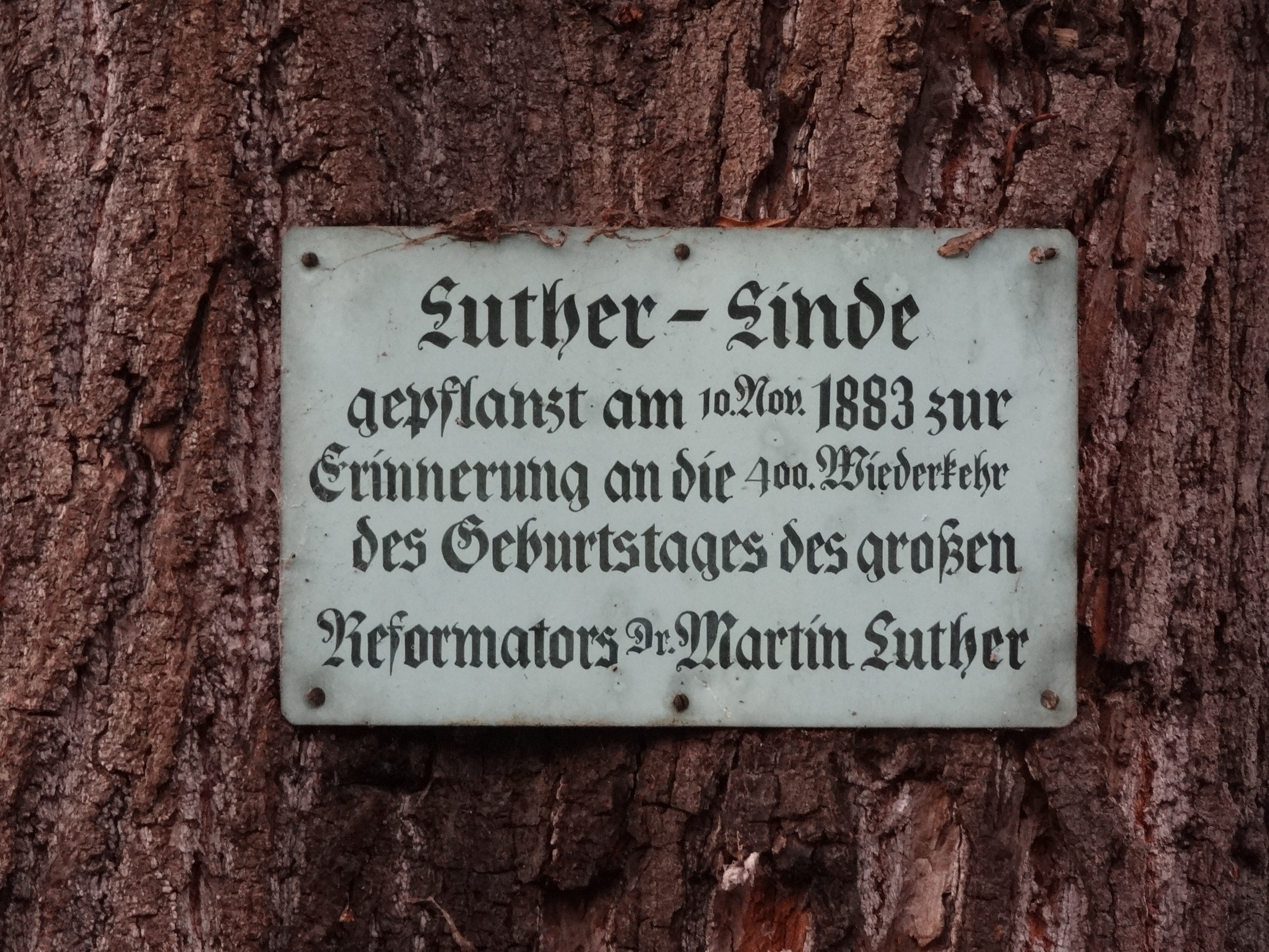 Lutherlinde und Stadteiche (Lich)